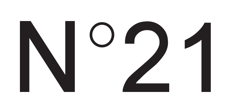 No.21 fashion house corporate logo